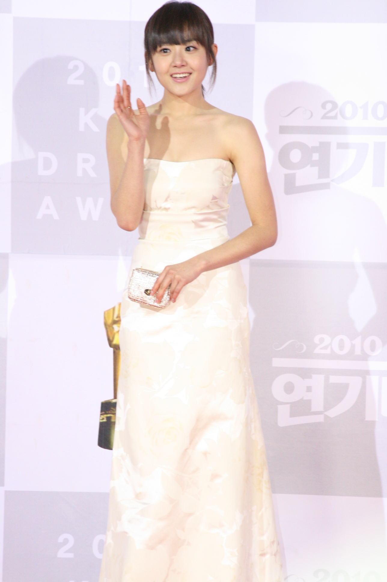 2010KBS연기대상 501